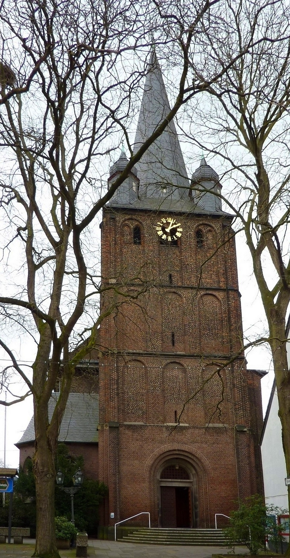 Uerdingen am rhein, kath. Kirche St. Peter, Turm